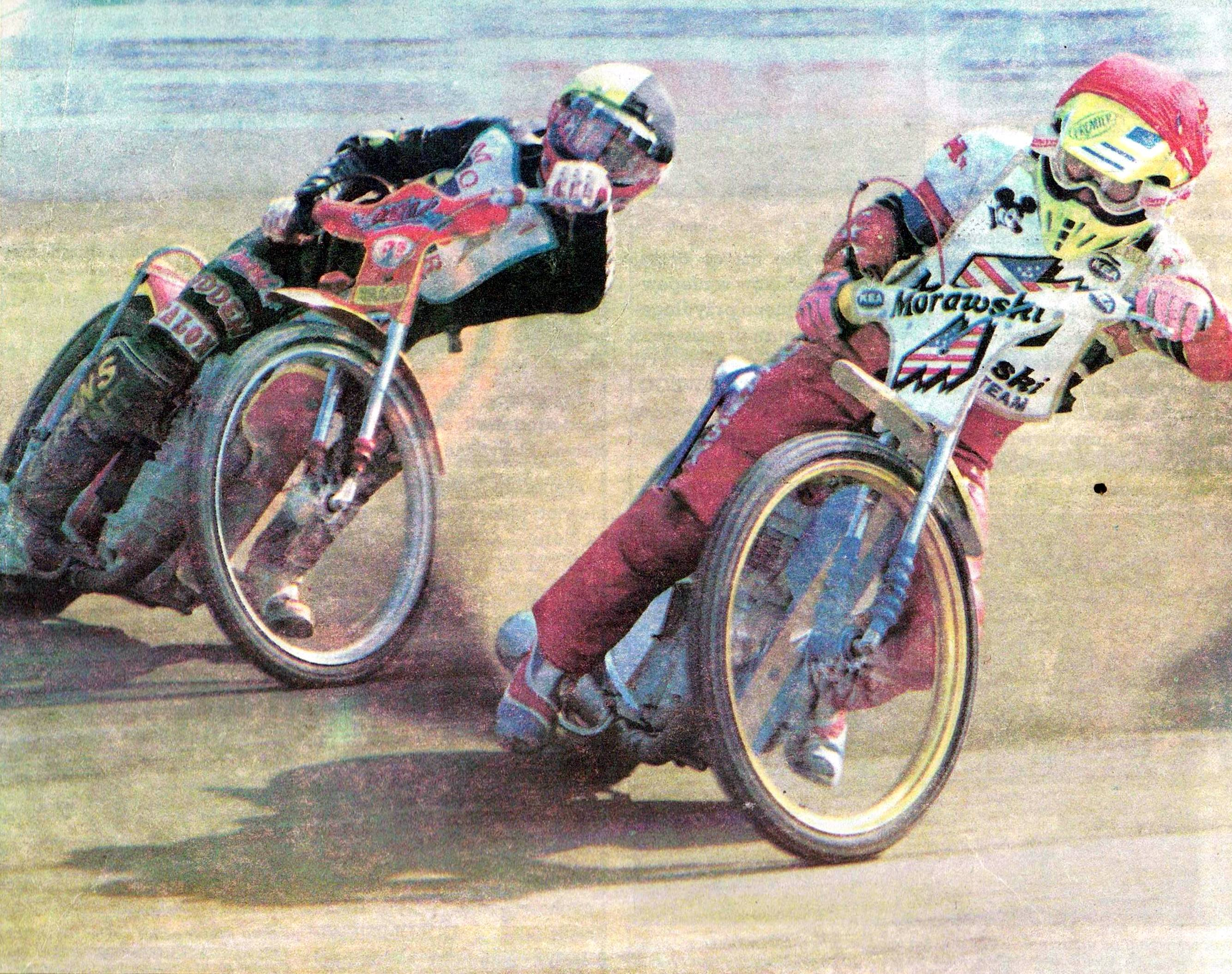 Leigh Adams i Andrzej Huszcza w 1991 roku. Mecz Morawski(Falubaz) Zielona Góra - Motor Lublin.